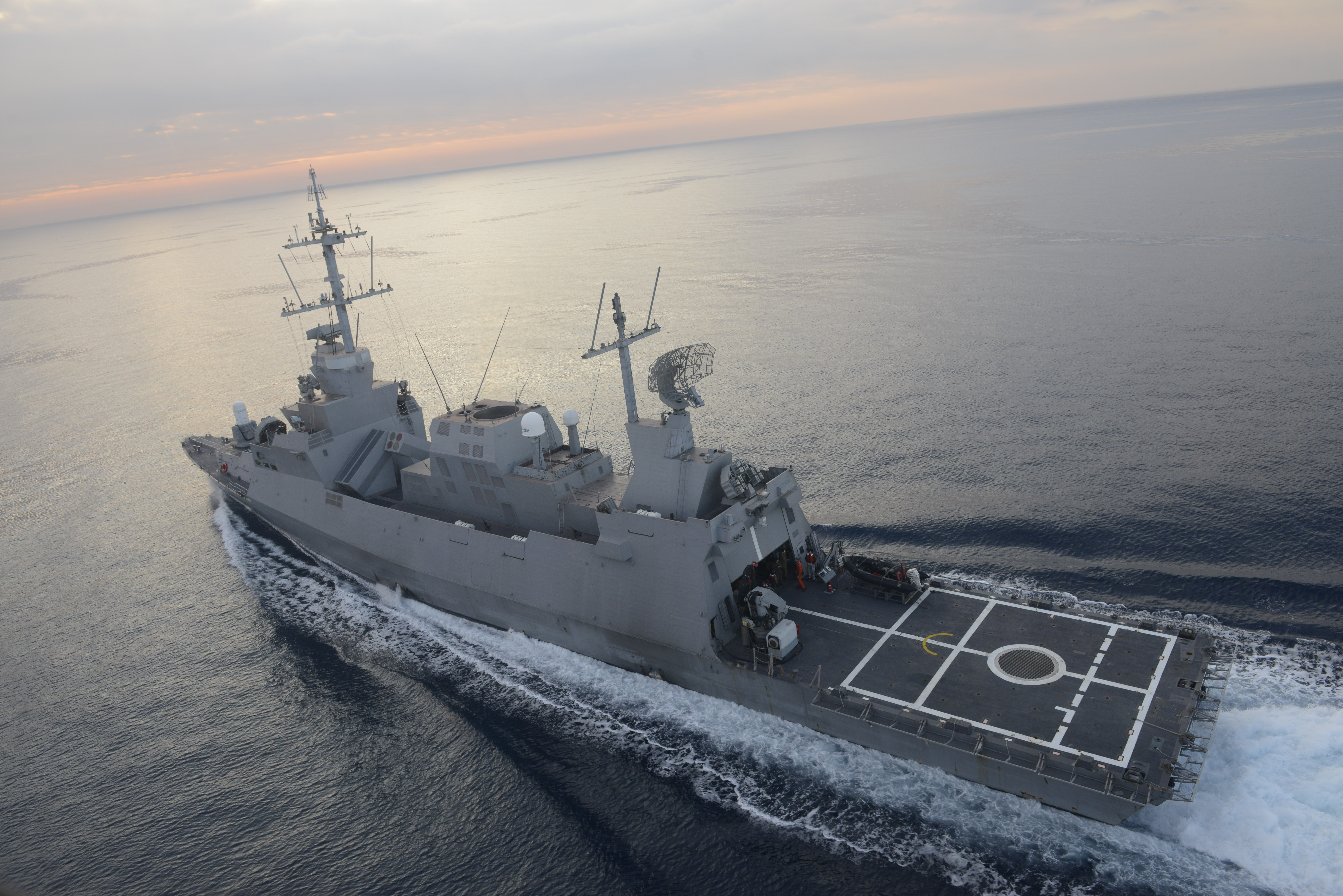 מבט על משטח הנחיתה של מסוק על קורבטה סער 5